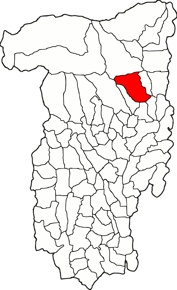 Lage der Stadt Călimănești im Kreis Vâlcea (RO).